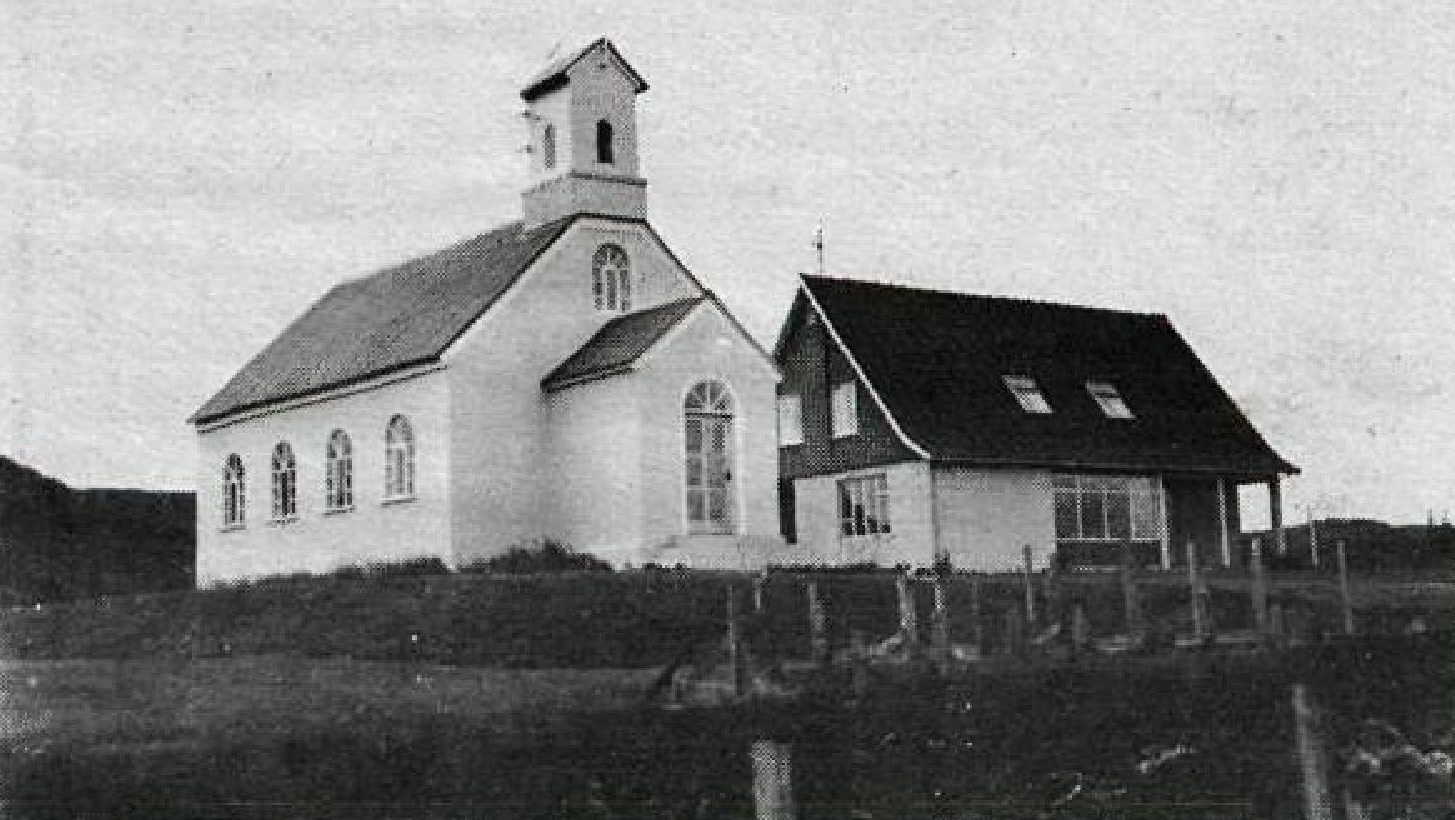 Borg á Mýrum - Borgarkirkja og íbúðarhús